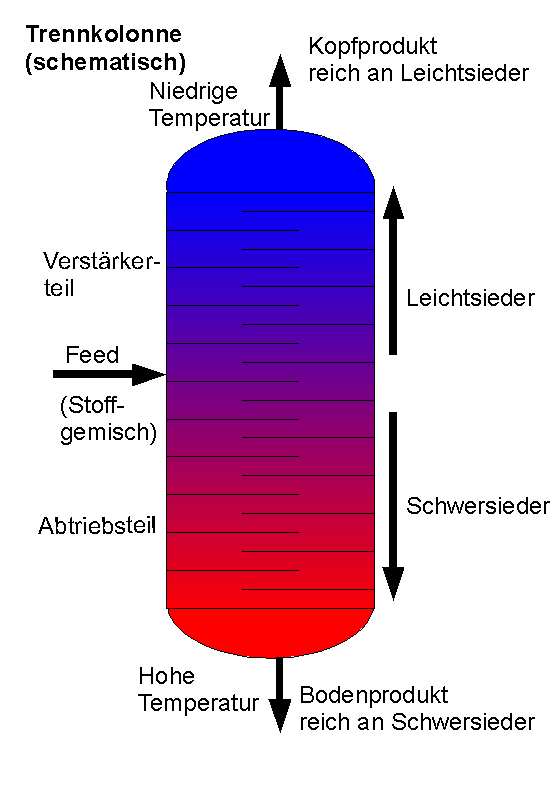 Grafik erläutert die Begriffe Leichtsieder und Schwersieder